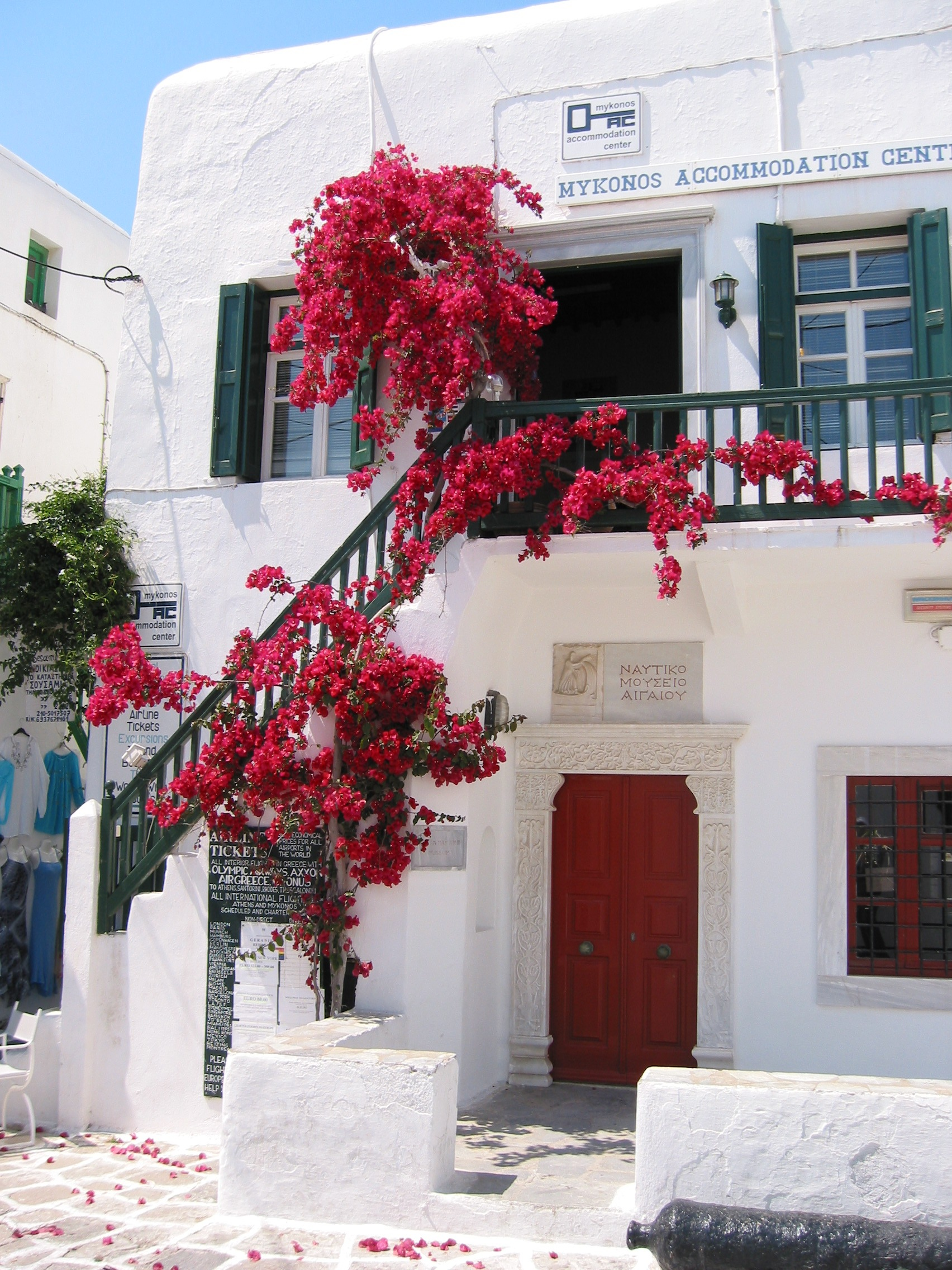 Mykonos, Bougainvillée en fleurs. Photo prise le 23/05/2004 par Harrieta171